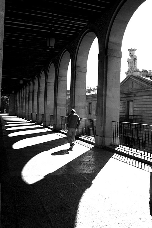 Gasteizko udaletxea Olagibelen Arkupetik ikusia.